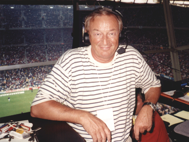 Andrzej Zydorowicz w studiu komentatorskim — stadion San Siro w Mediolanie.